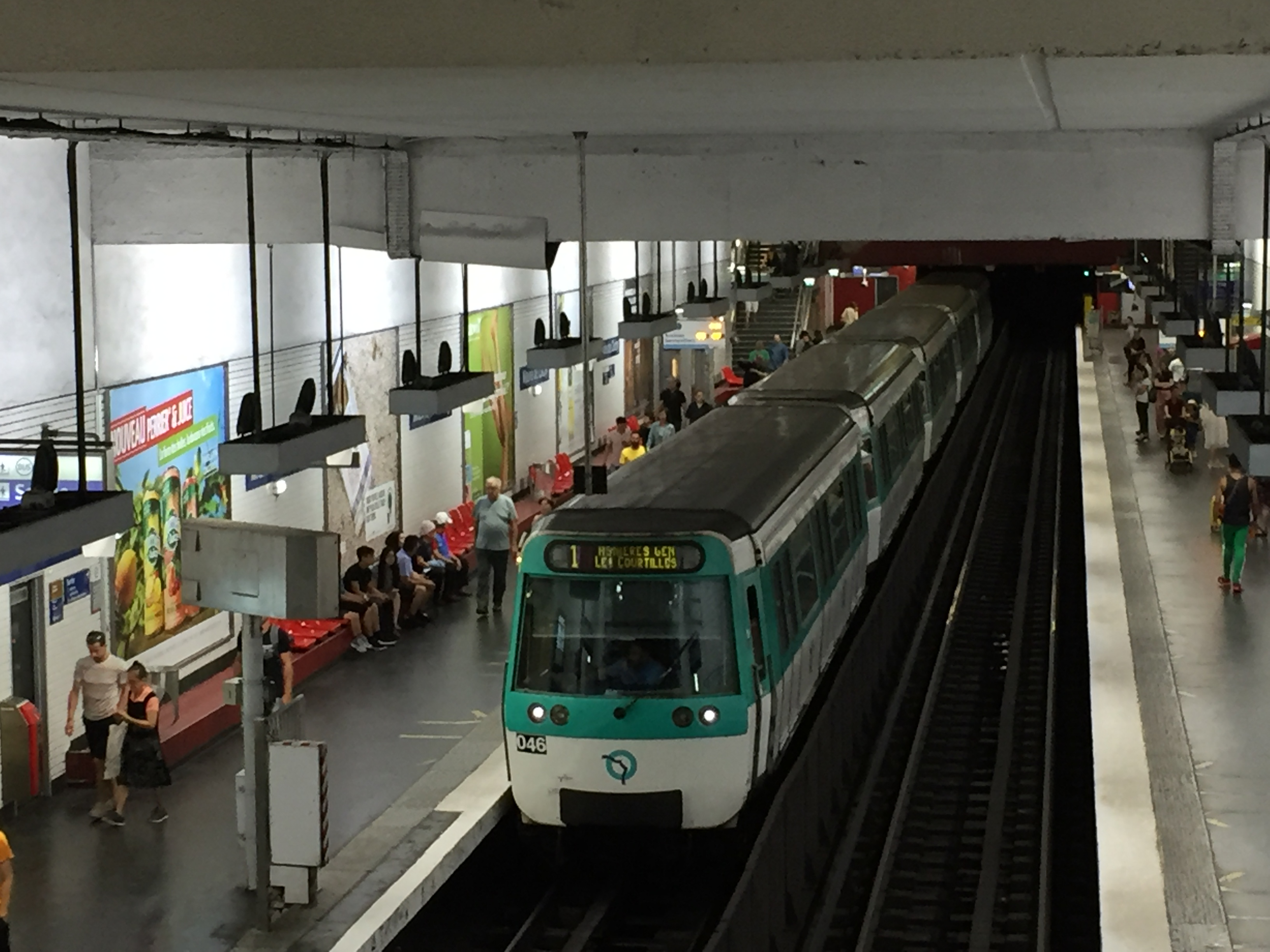 En août 2018, la station de métro Mairie de Clichy avec une rame de métro à quai en direction de Les Courtilles.